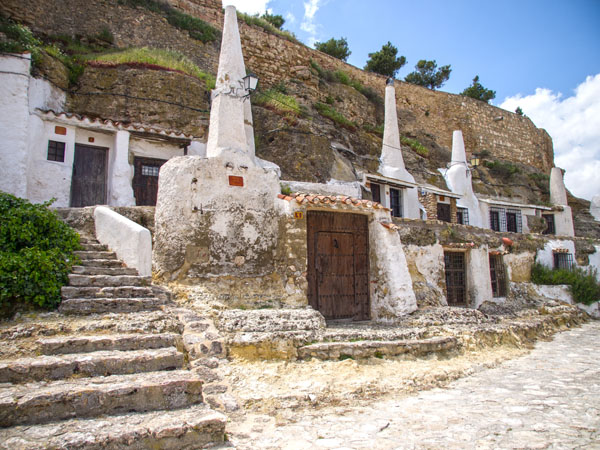 Casas -Cueva de Chinchilla de Montearagón